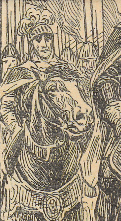 Hertug Valdemar 5. af Slesvig til hest (året skal forestille at være 1340). Han var tidligere 1326-1329 dansk konge under navnet Valdemar 3. Illustration af Poul Steffensen (1866-1923) til "National Udgave" fra 1913 af B. S. Ingemanns roman - "Prins Otto af Danmark".